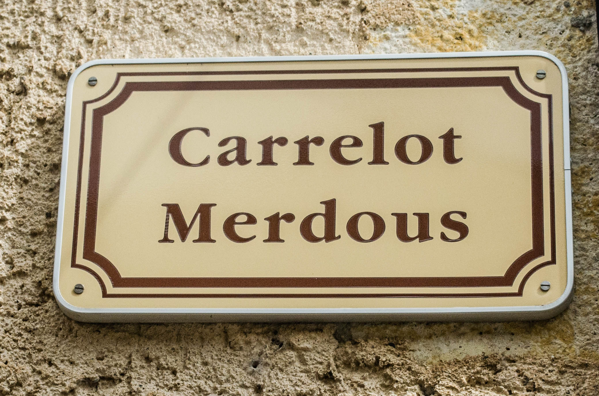 Plaque de rue à Lectoure, Gers, France : carrelot merdous (ruelle merdeuse), venelle le long de laquelle se trouvaient des tanneries, industries dégageant de fortes odeurs.